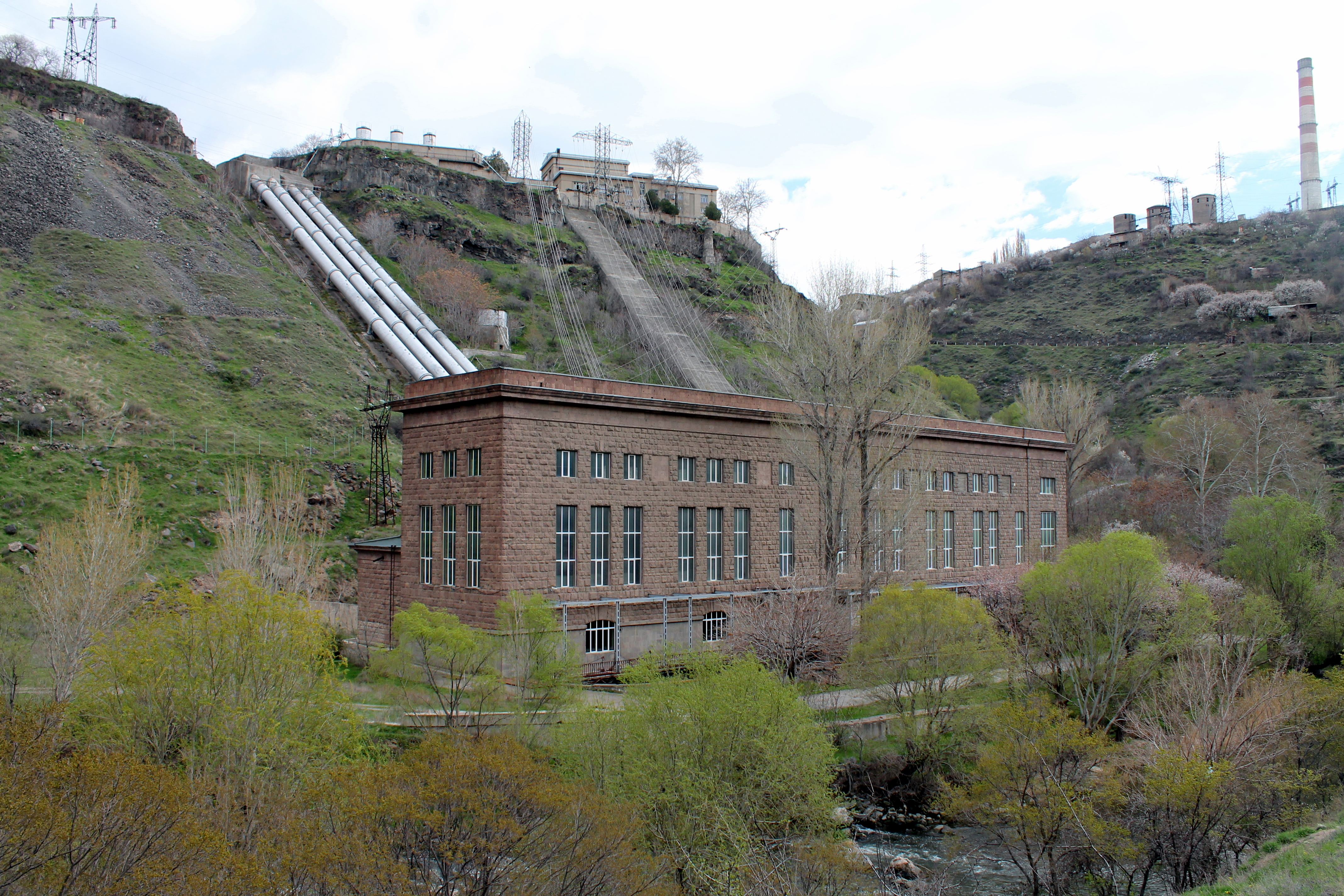 Здание Канакерской ГЭС